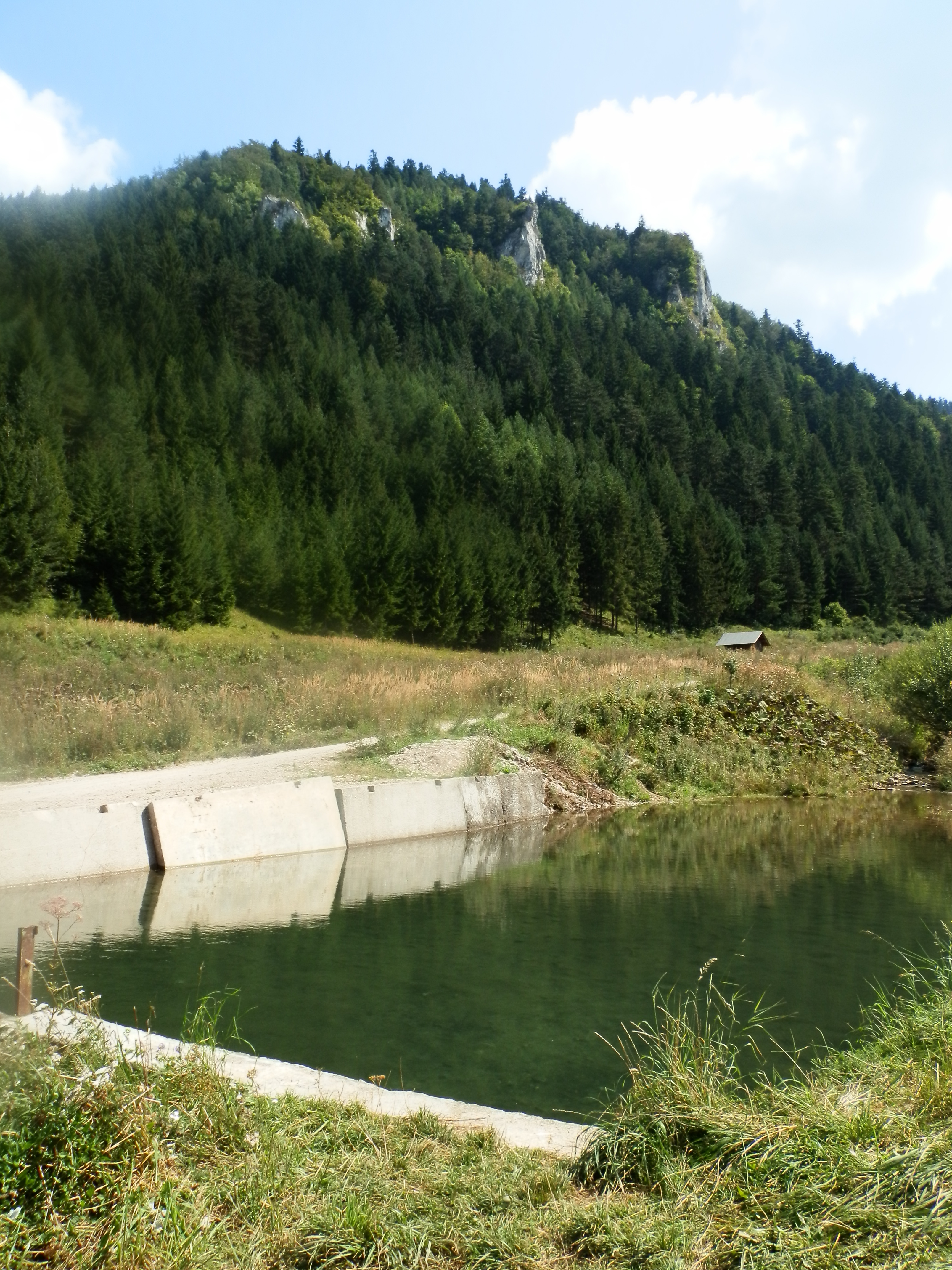 Hrádza pod Sokolom